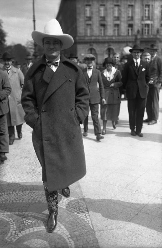 Tom Mix, der König der Cowboys, der augenblicklich höchstbezahlte Filmschauspieler der Welt befindet sich zu Vergnügungszwecken in Berlin.